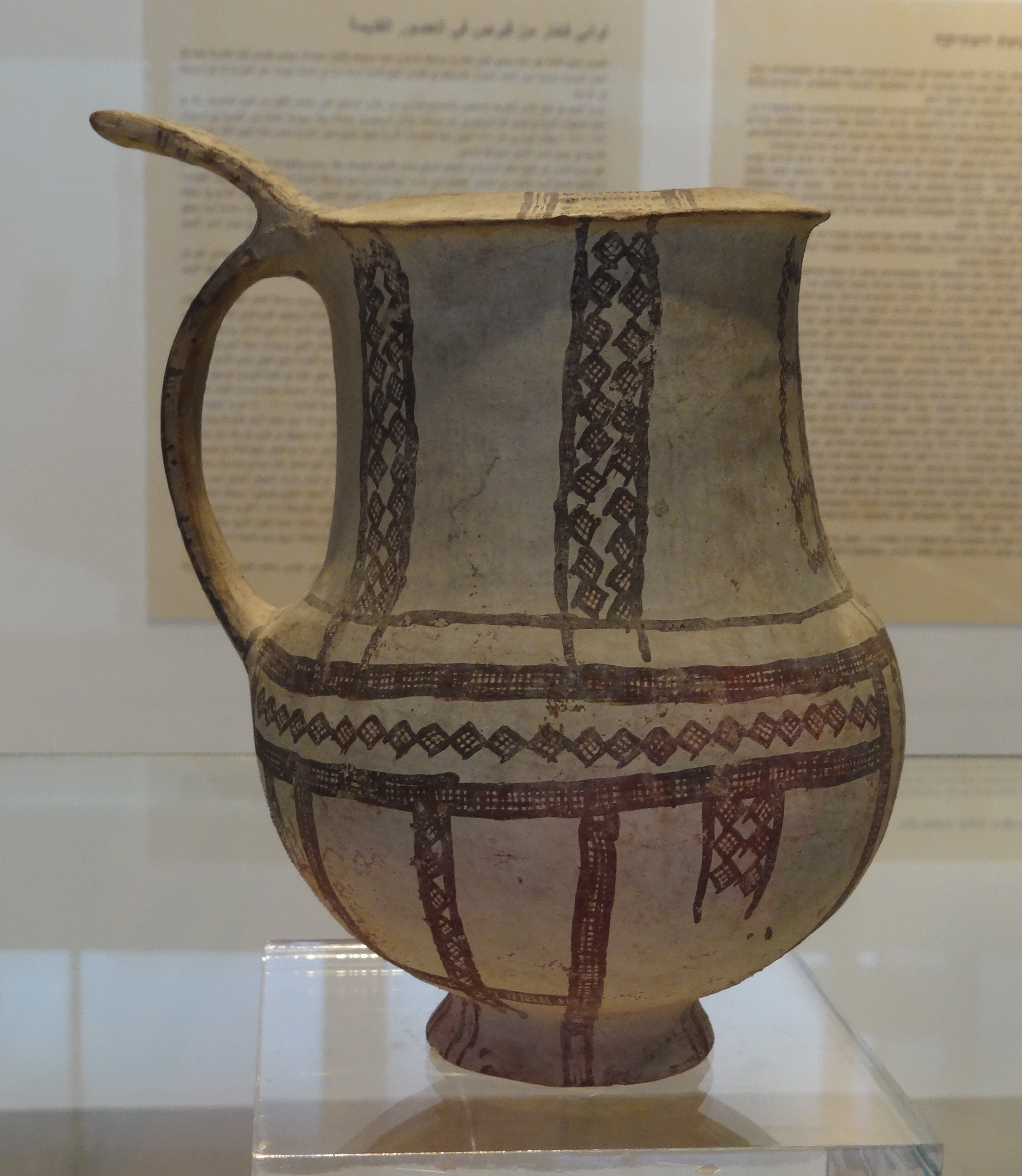 White Slip ware pottery Late Bronze age II 14th-13th centuries BCE from Cyprus. Israeli National Maritime Museum כלים מחופים לבן היא משפחה של כלי קרמיקה שמקורה בקפריסין. הכלים נעשו ביד. ניצנים ראשונים של משפחת כלים זו הופיעה כבר בסוף תקופת הברונזה התיכונה, אבל עיקר תפוצתה בתקופת הברונזה המאוחרת מתוך תערוכה "כלי חרס מקפריסין בעת העתיקה" המוזיאון הימי הלאומי פך טנקרד, כלים מחופים לבן 2